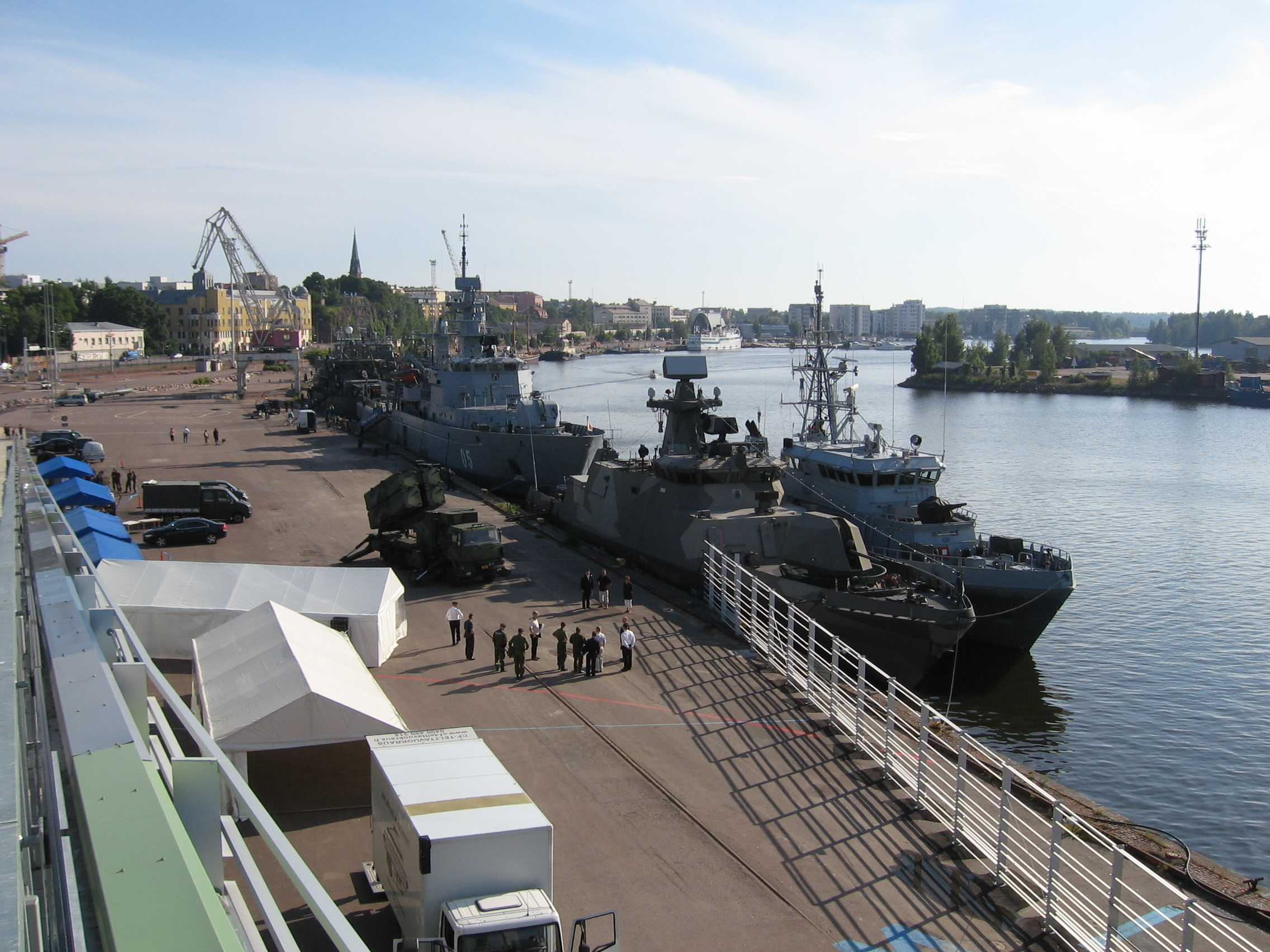 Kotkan Kantasatama Suomen Merimuseon eli Merikeskus Vellamon katolta nähtynä. Kuva on otettu Suomen merivoimien laivaston vierailupäivänä.